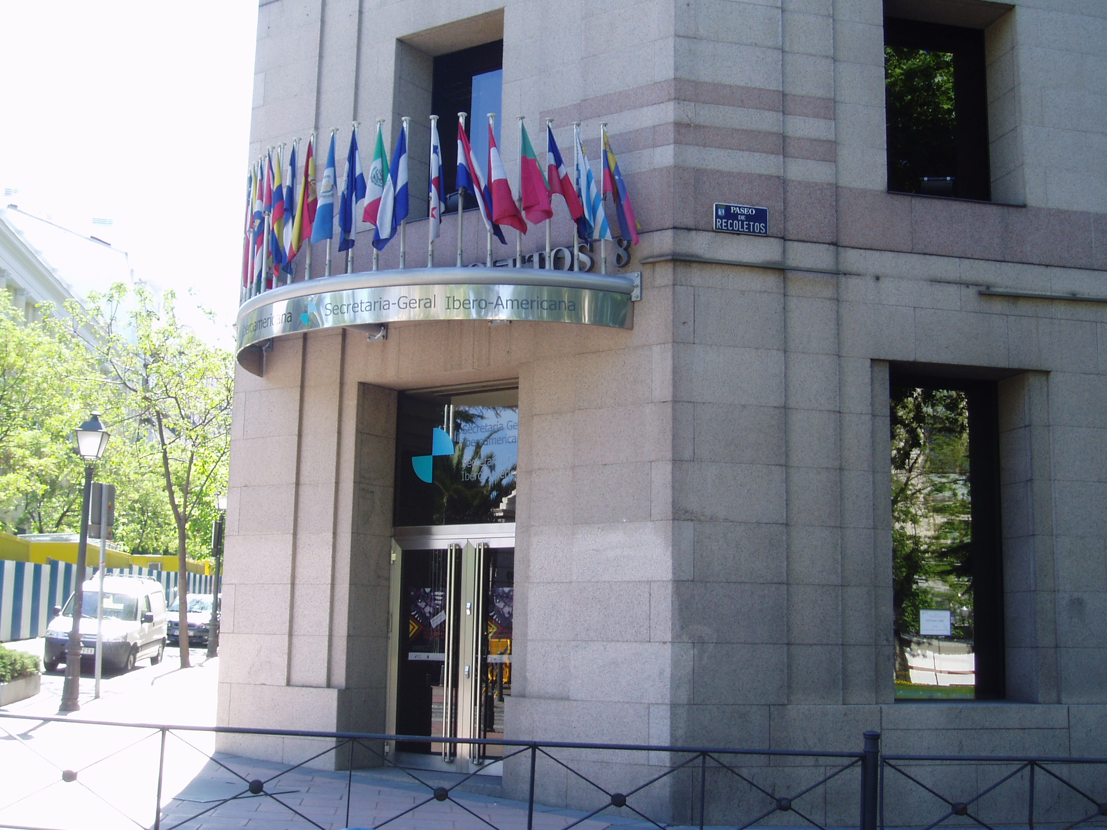 Sede de la SEGIB (Secretaría General Iberoamericana), ubicada en el paseo de Recoletos nº 8, Madrid, España.